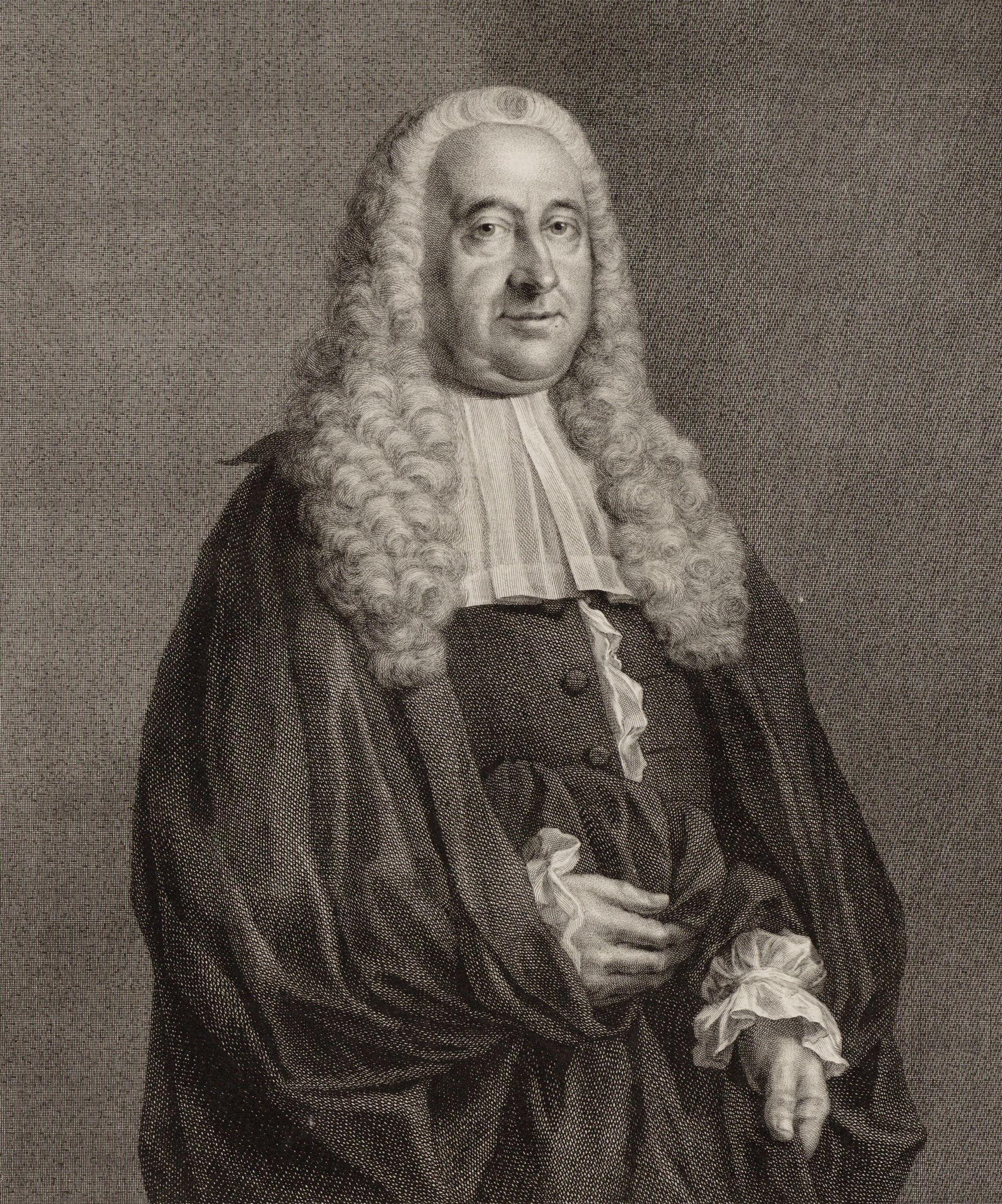 Cornelis Hop (1685-1762) Ambassadeur der Republiek in Frankrijk; daarna vele malen burgemeester.